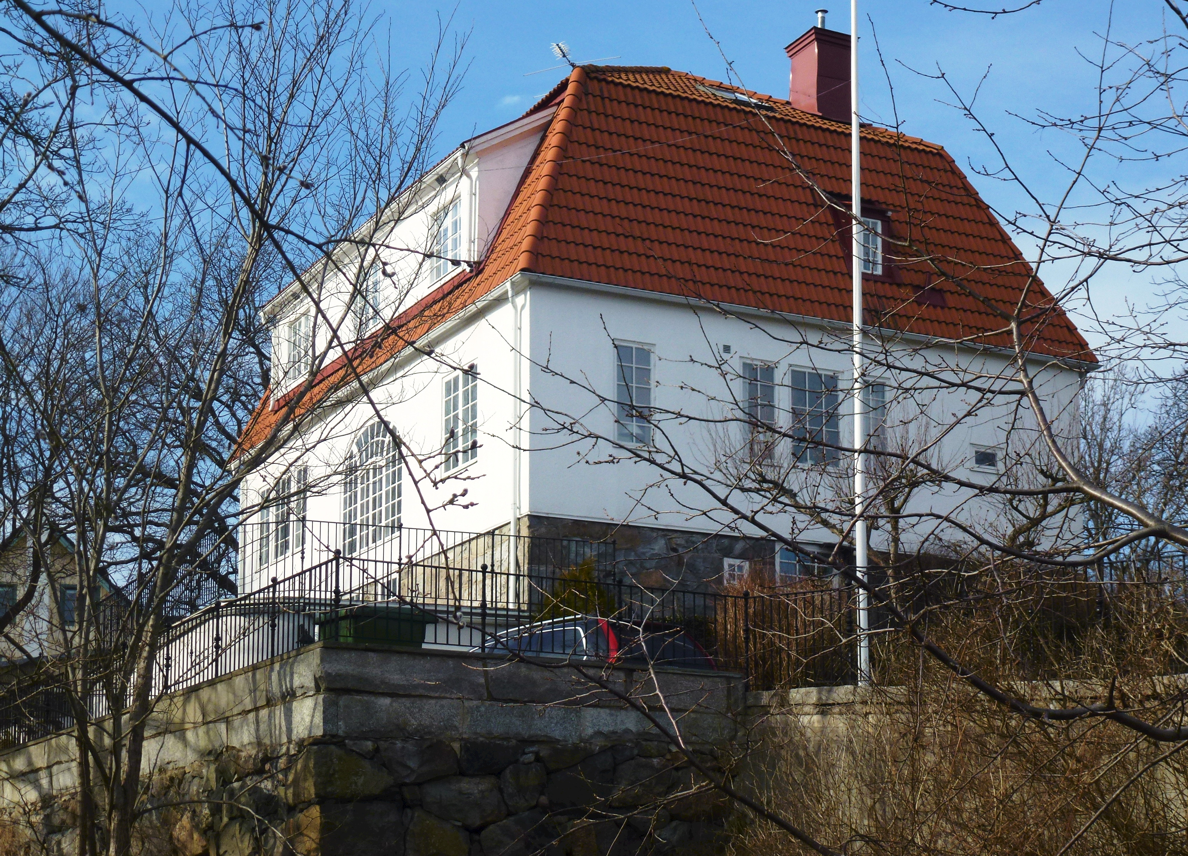 Villa Gärdsgården, Sturevägen 37, arkitekt Ragnar Östberg, byggherre Alf Wallander